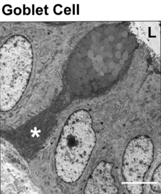 Figura 7. Caracterización epitelial microscópica de transmisión electrónica. Se muestra la apariencia ultraestructural y la caracterización de las células epiteliales del colon porcino. Células caliciformes de colon. Microscopía electrónica de transmisión. Barra de escala de 5 µm.